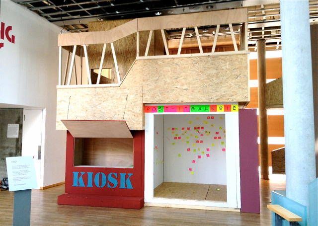 Building Blocks Berlin "Buntes Schneckenhaus", BARarchitekten